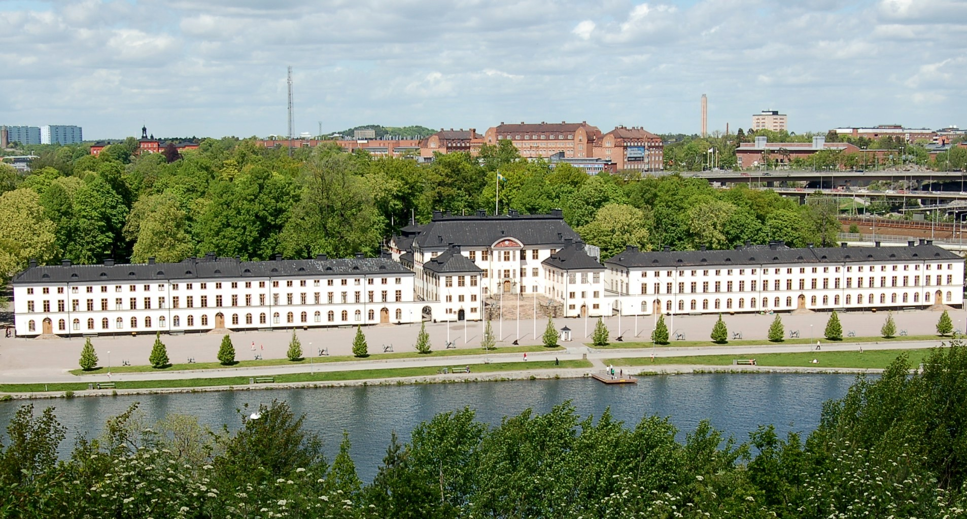 Karlbergs slott i Solna från Stadshagen